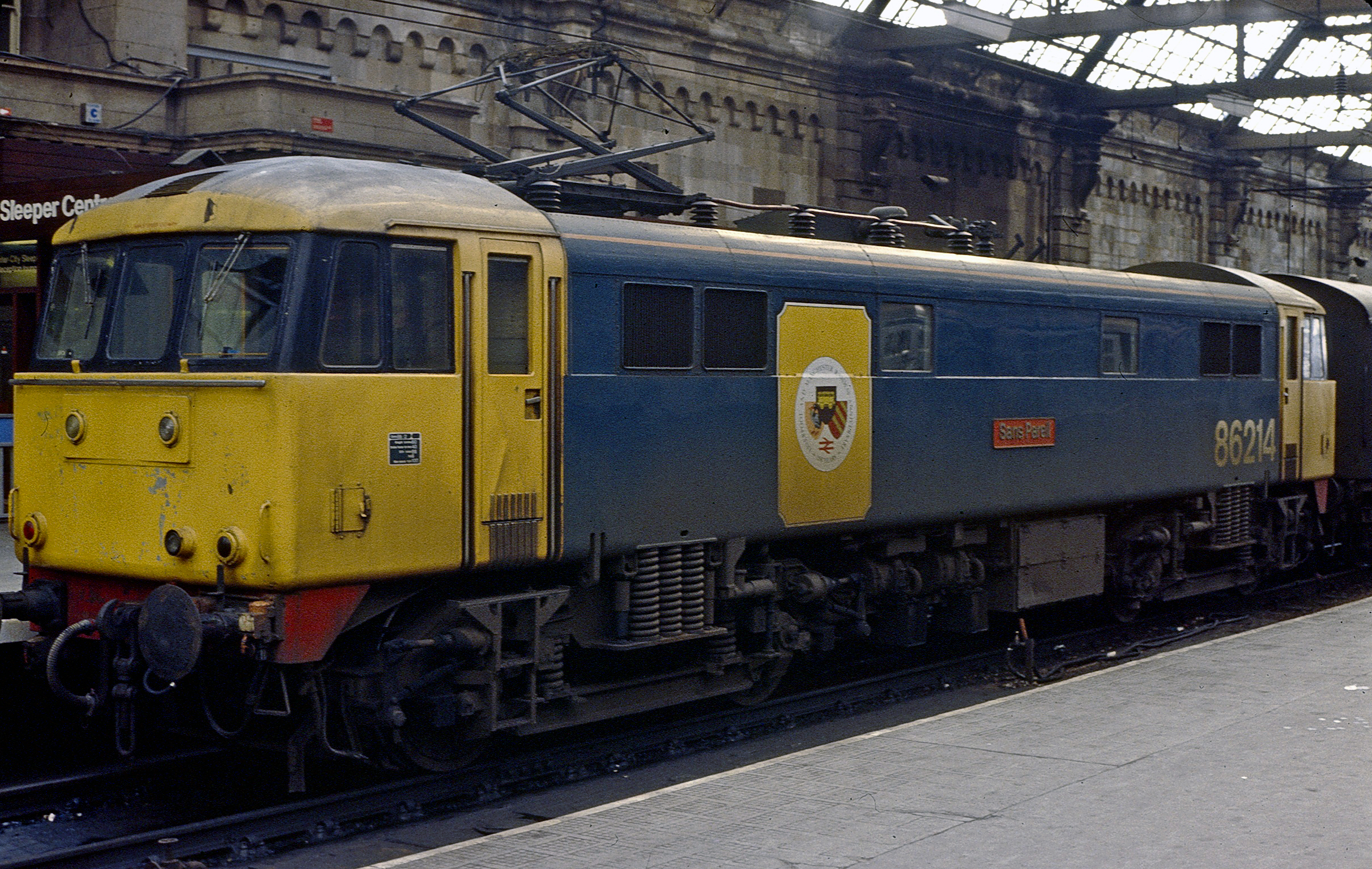 March 1982